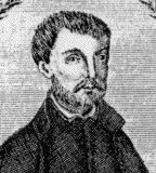 Szlovák Wiki alapján